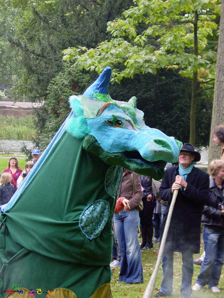 draak op st michaelsdag